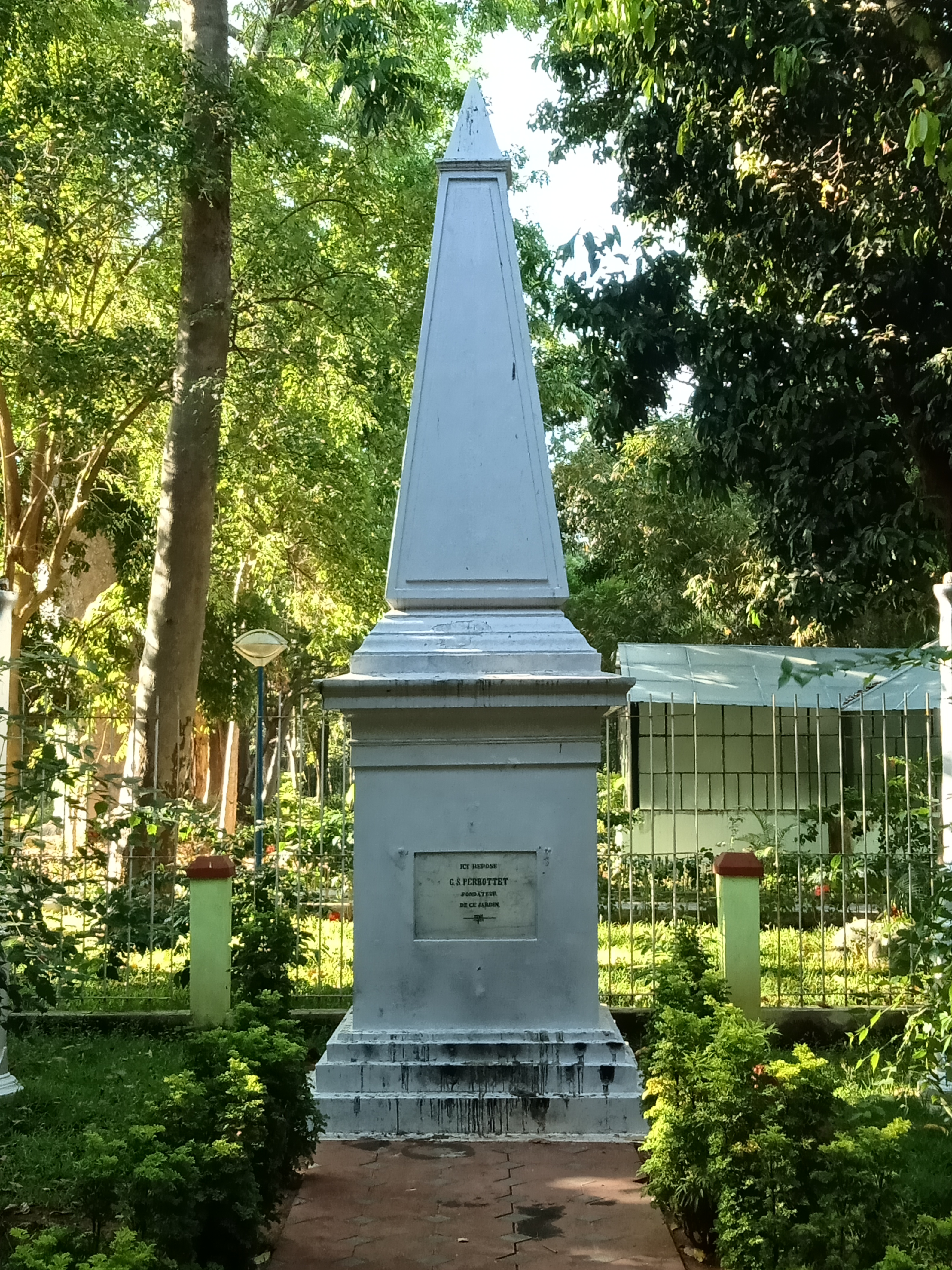 Memorial to GS Perrottet